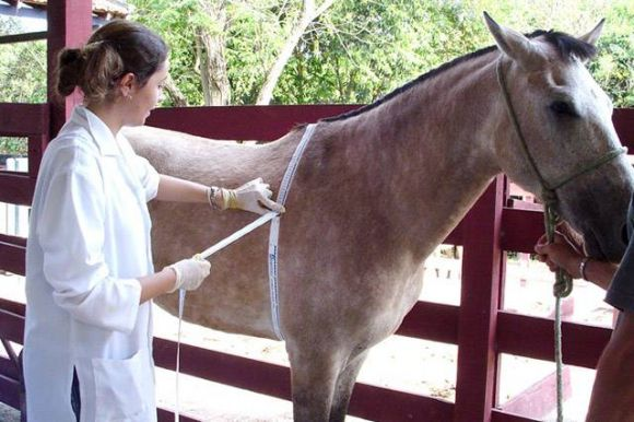 Clinica escola med. veterinaria